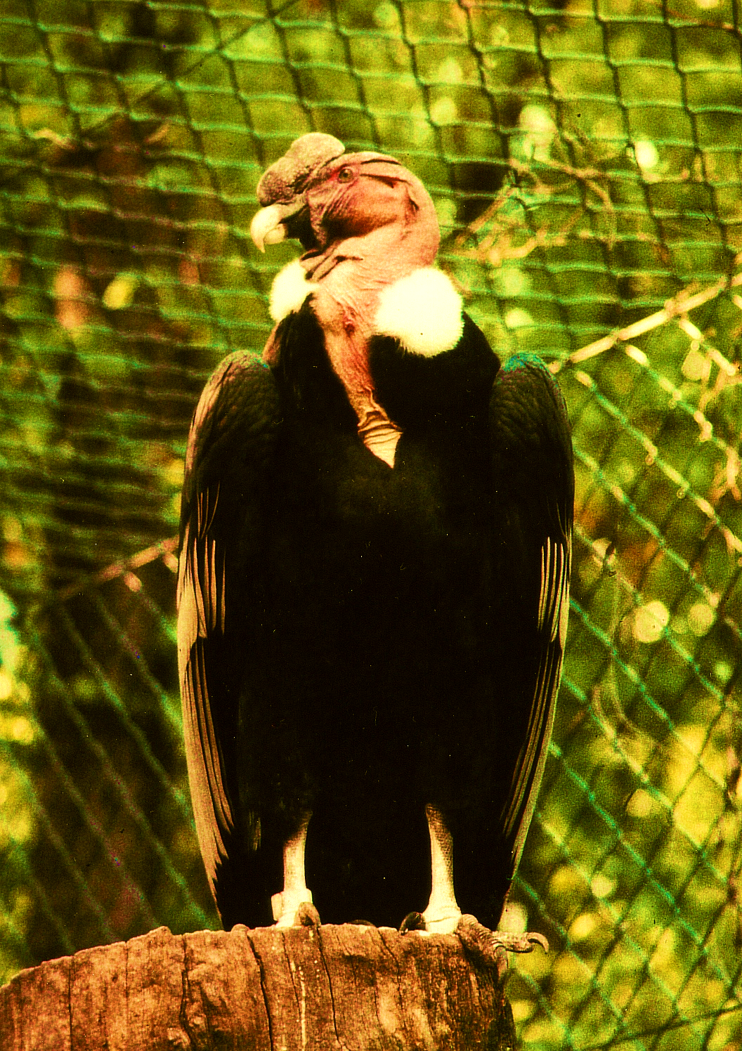 Andenkondor (Vultur gryphus) im Tiergarten Nürnberg. Mit freundlicher Genemigung durch den Tiergarten Nürnberg zur Verfügung gestellt. Andean condor. Condor de los Andes.